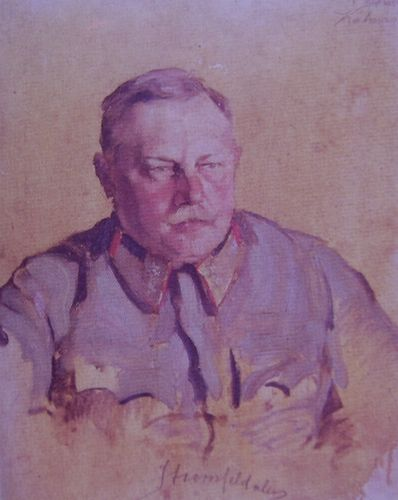 General Aurel Stromfeld of Hungary Stromfeld Aurél tábornok, a magyar hadsereg főtisztje az első világháborúban, a Magyar Vörös Hadsereg főparancsnoka a románok és a csehszlovákok elleni harcok idején